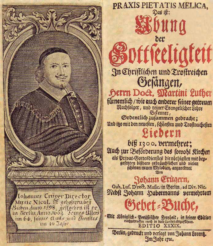 Titelbild - "Praxis Pietatis Melica - Übung der Gottseeligkeit..."